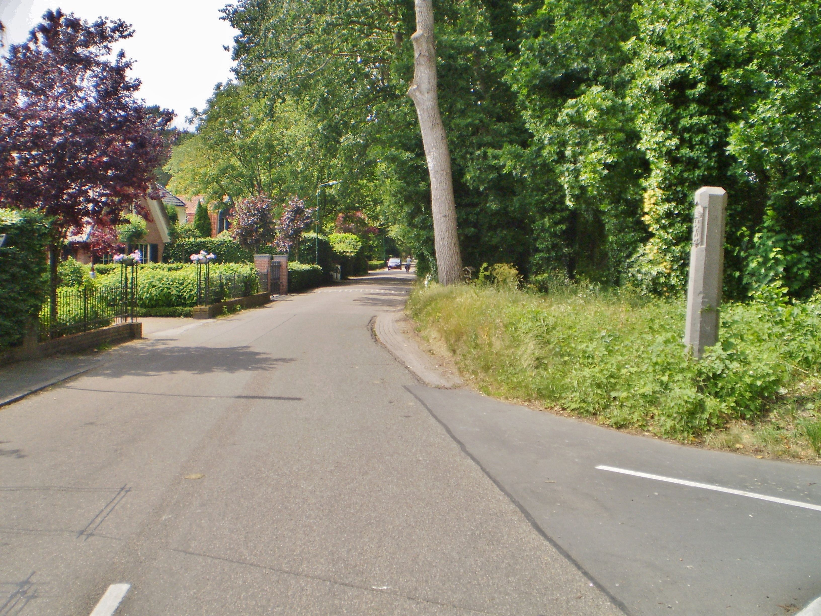 Graaf Floris V Weg, richting Egelshoek. Rechts een leeuwenpaal